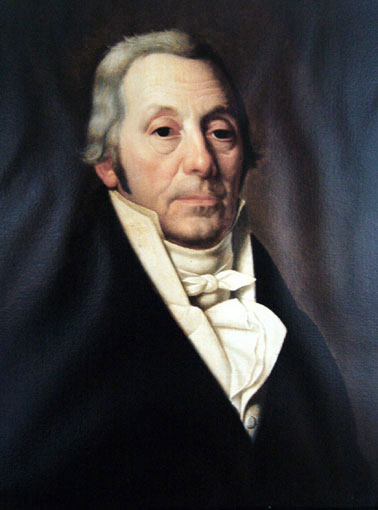 Johann Caspar Engels (* 28. Februar 1753; † 29. Juli 1821), deutscher Manufakturbesitzer